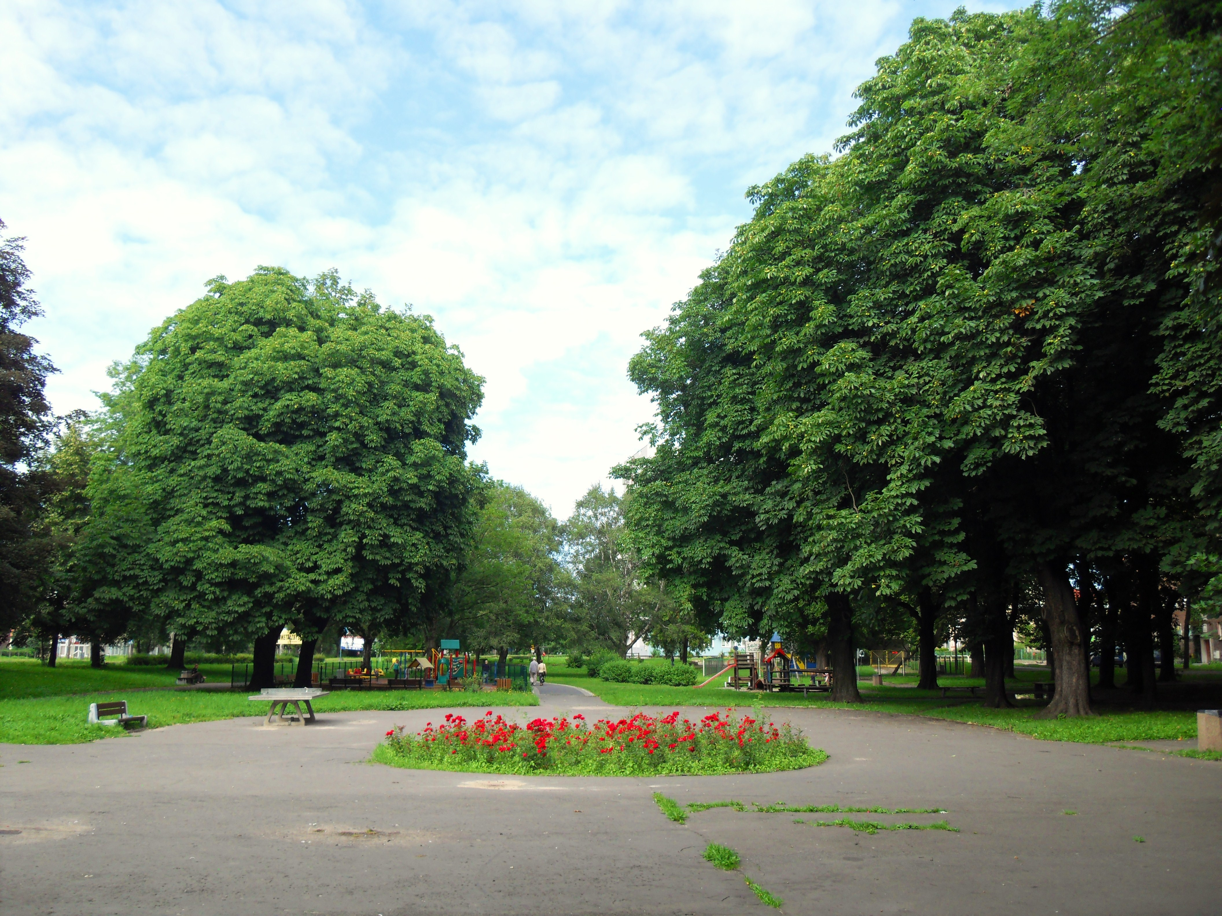 Gdańsk Śródmieście, park Siennicki.